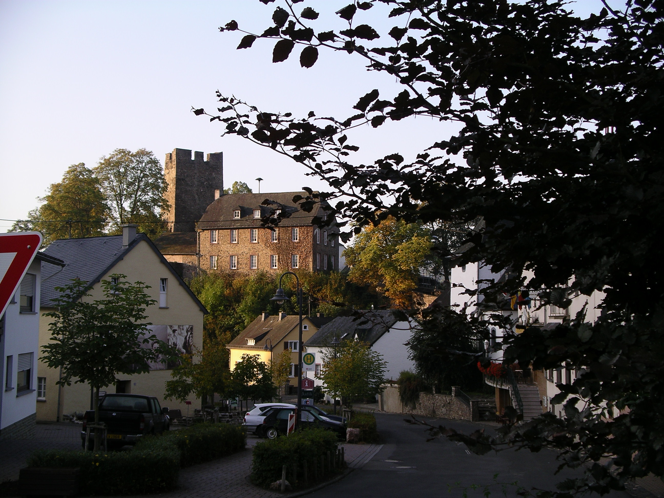 Blick von Dasburg aus auf die Burg